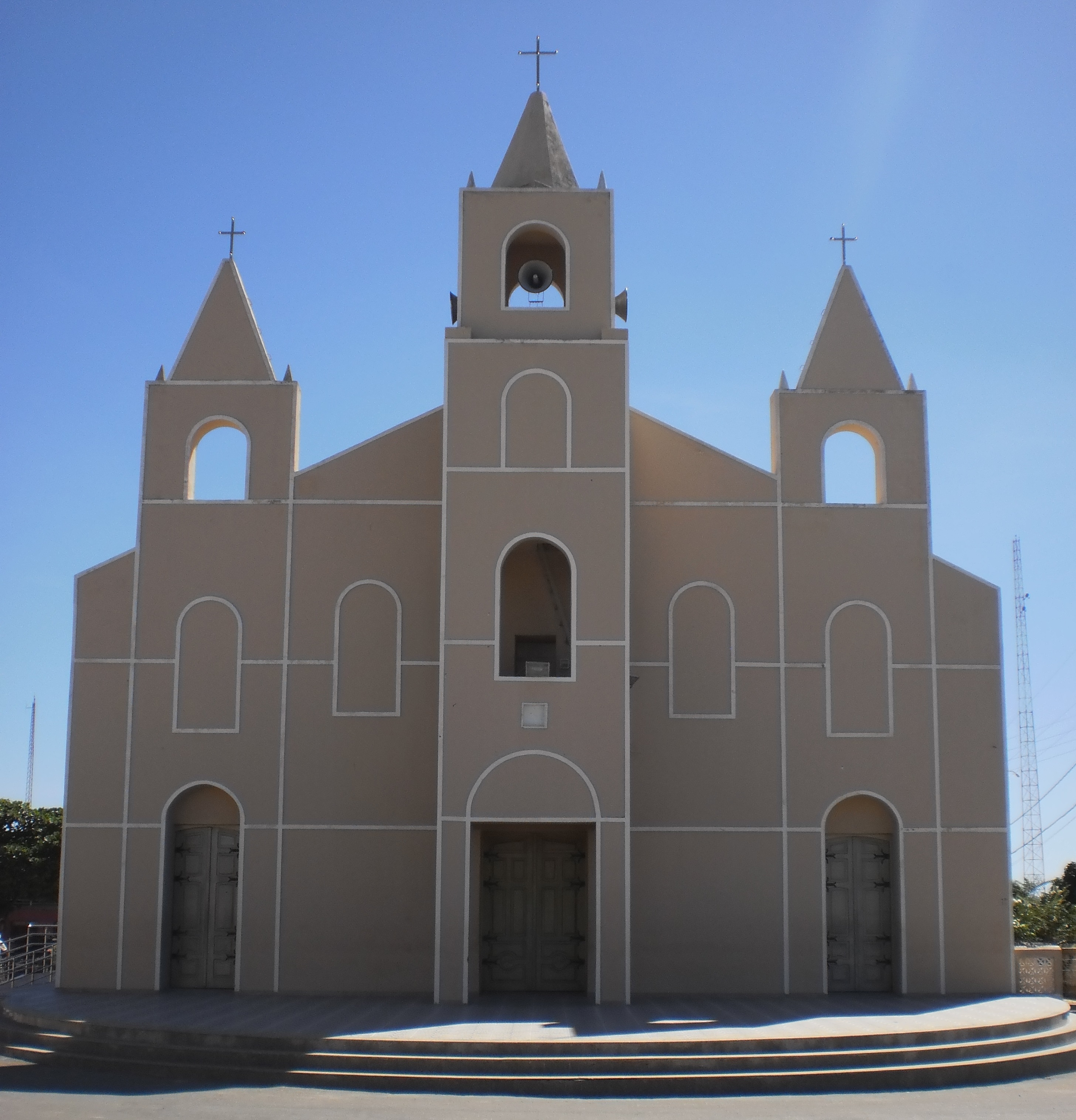 Igreja Matriz de Nossa Senhora da Conceição. Portalegre, Rio Grande do Norte, Brasil.